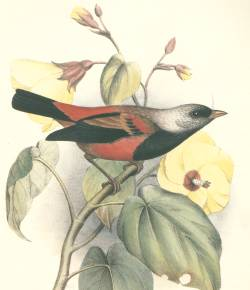 `ULA -`AI -HAWANE (Ciridops anna)